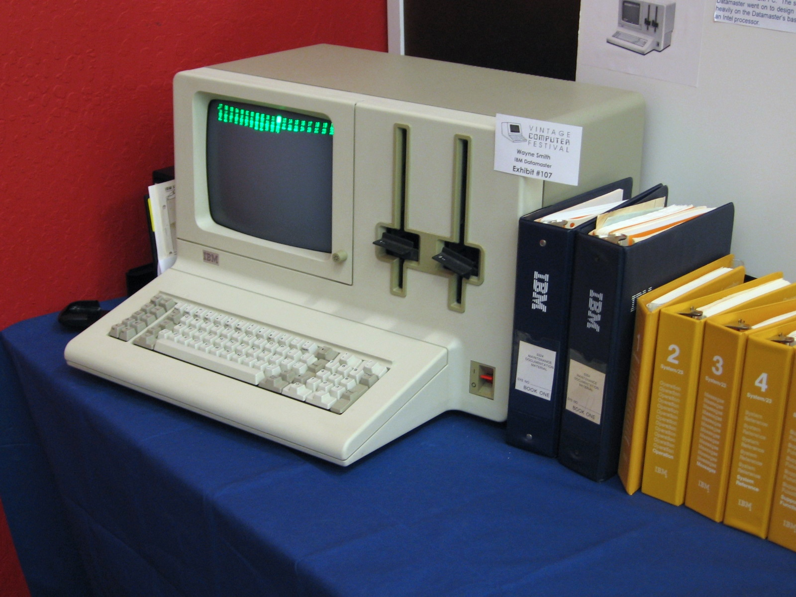 IBM Datamaster